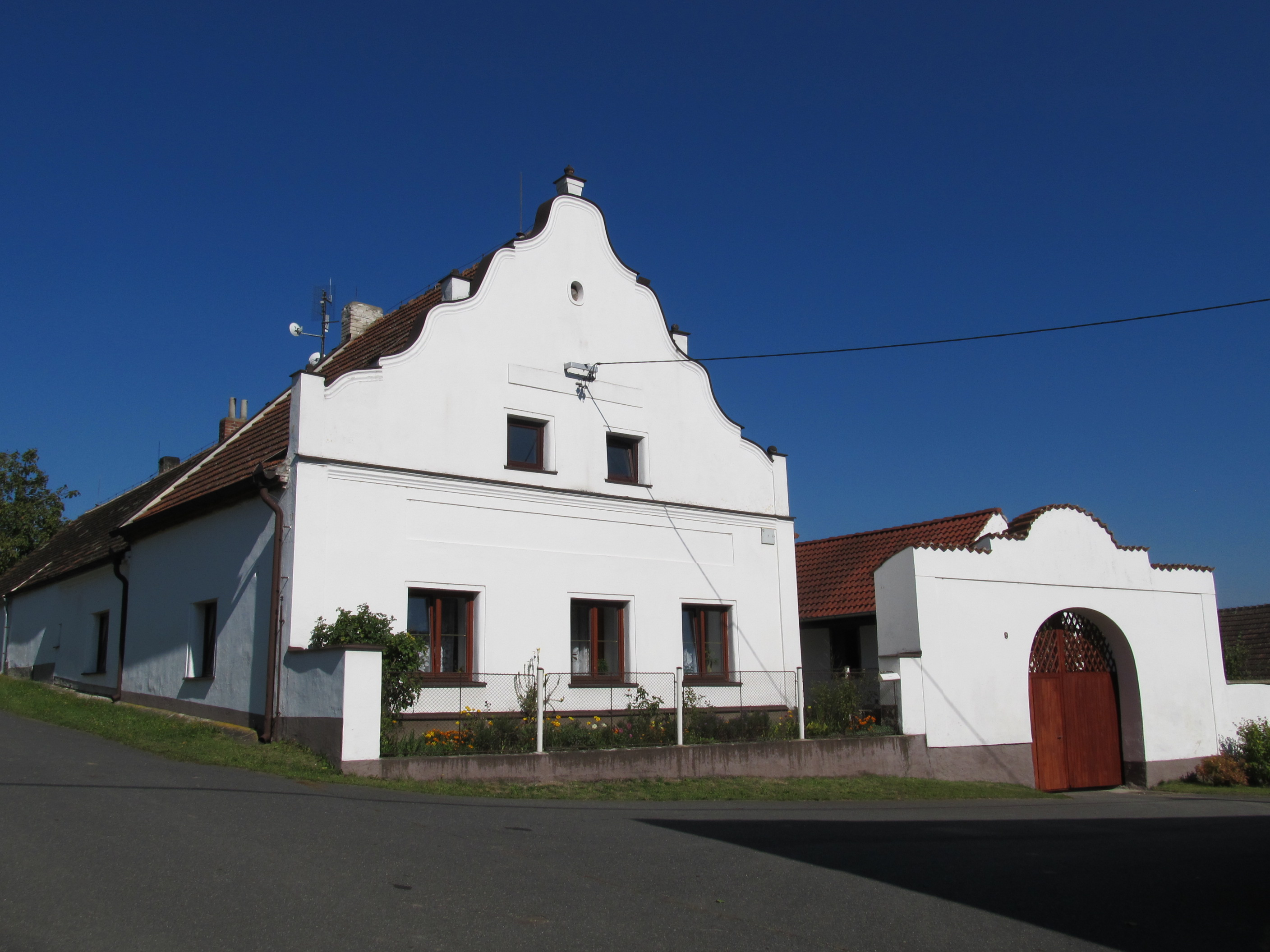 Vlkonice - statek č. 9